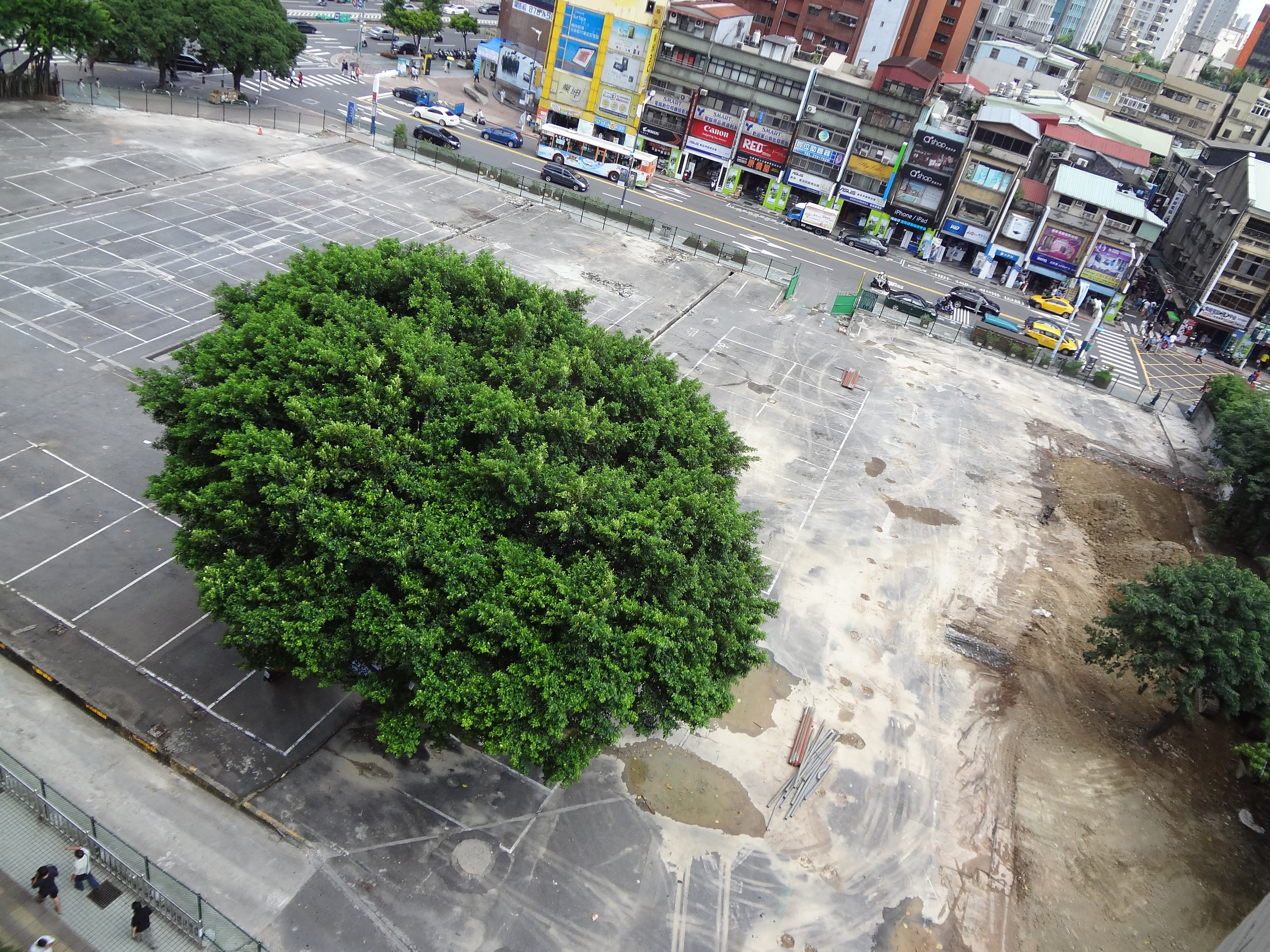 從光華數位新天地俯望已拆除的台北希望廣場。